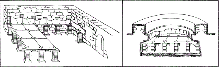 Perspectivas del hipocausto (izquierda) y del baño (derecha)